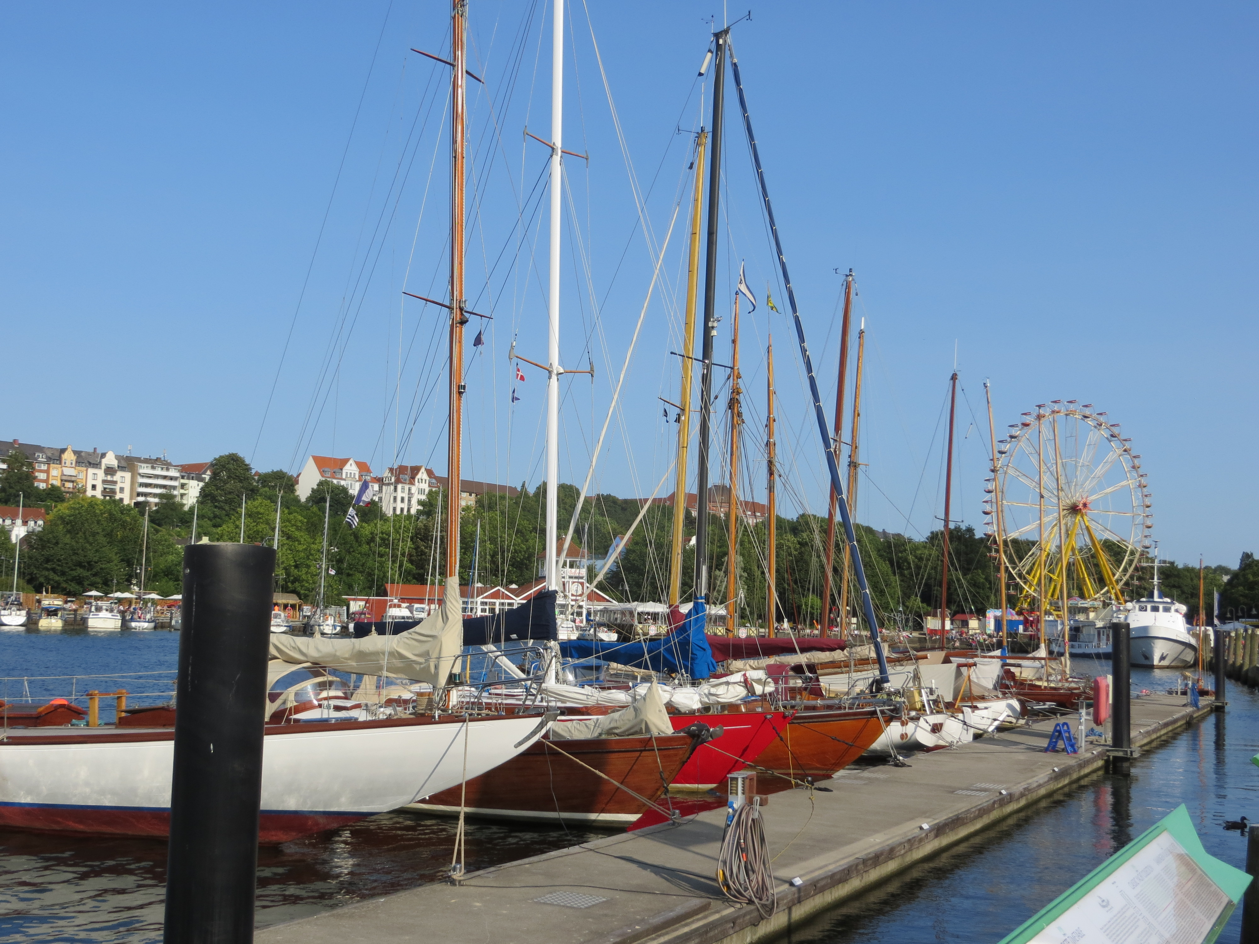 Dampf Rundum 2013, Riesenrad an der Hafenspitze, Bild 05